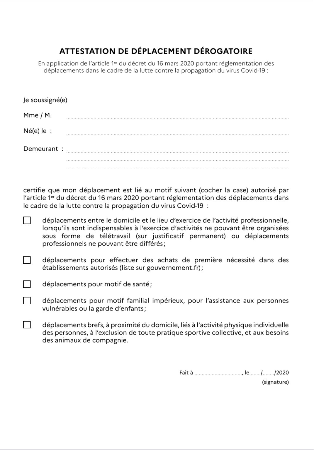 Attestation de deplacement dérogatoire mise en place par le gouvernement français lors du confinement